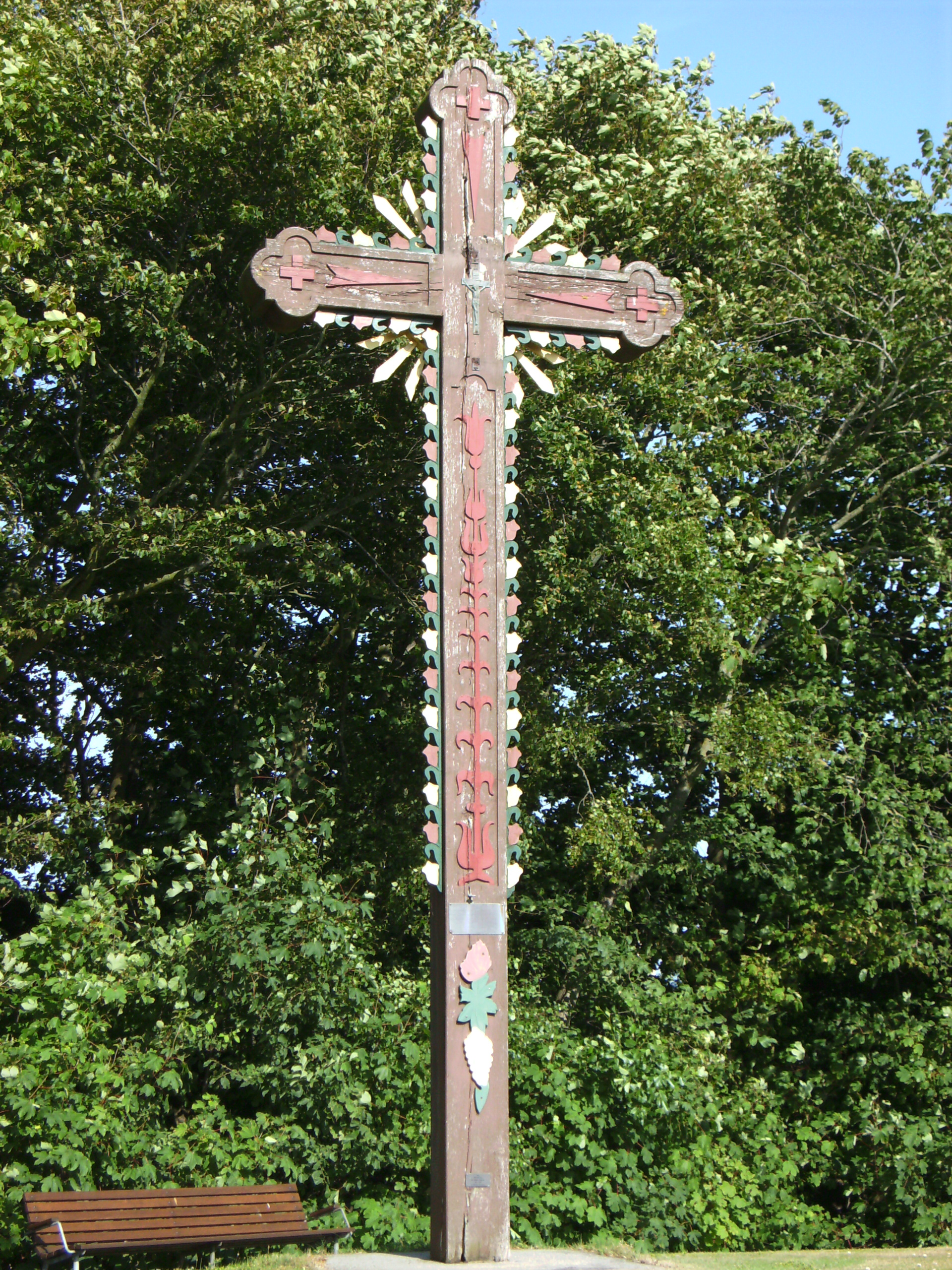 Dragsbæklejren lå syd for Thisted og blev bygget under 2. Verdenskrig som tysk vandflyverstation Former station for hydroplanes during the german occupation of denmark in World War 2 Mindesmærke for Dragsbæklejrens tid som flygtningelejr Memorial made by refugees after World War 2